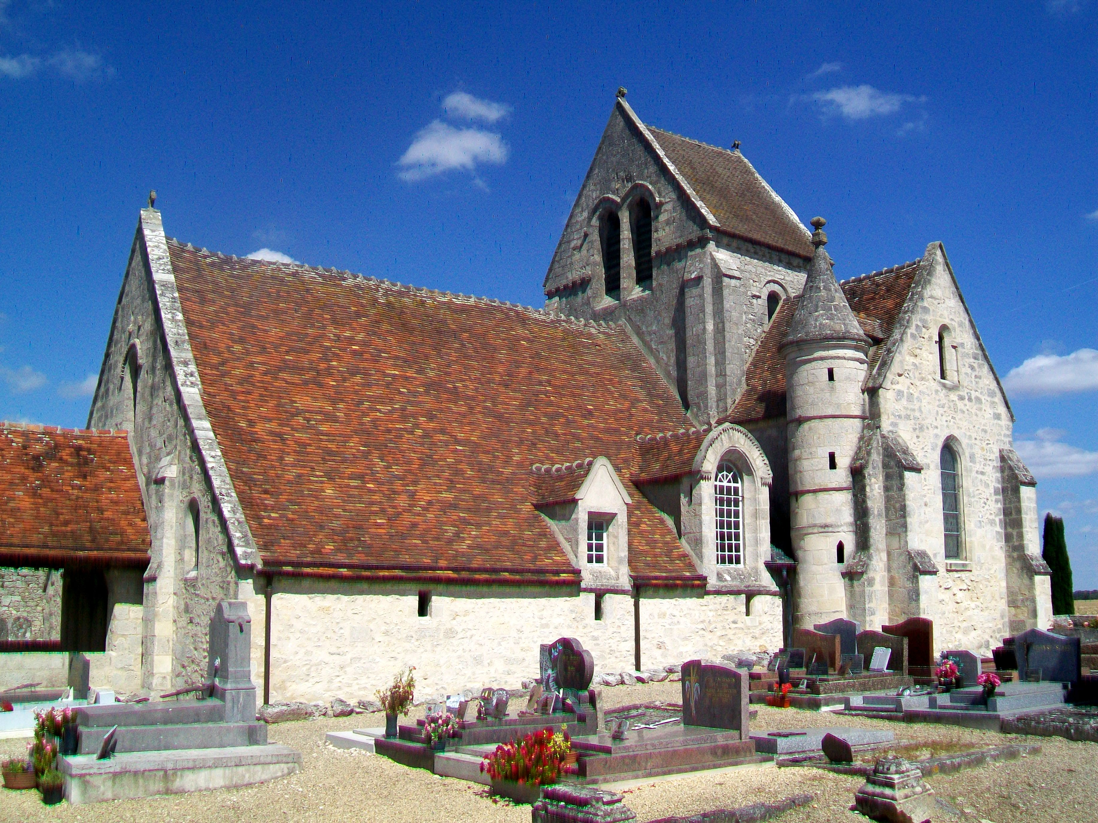 Vue d'ensemble depuis l'ouest.